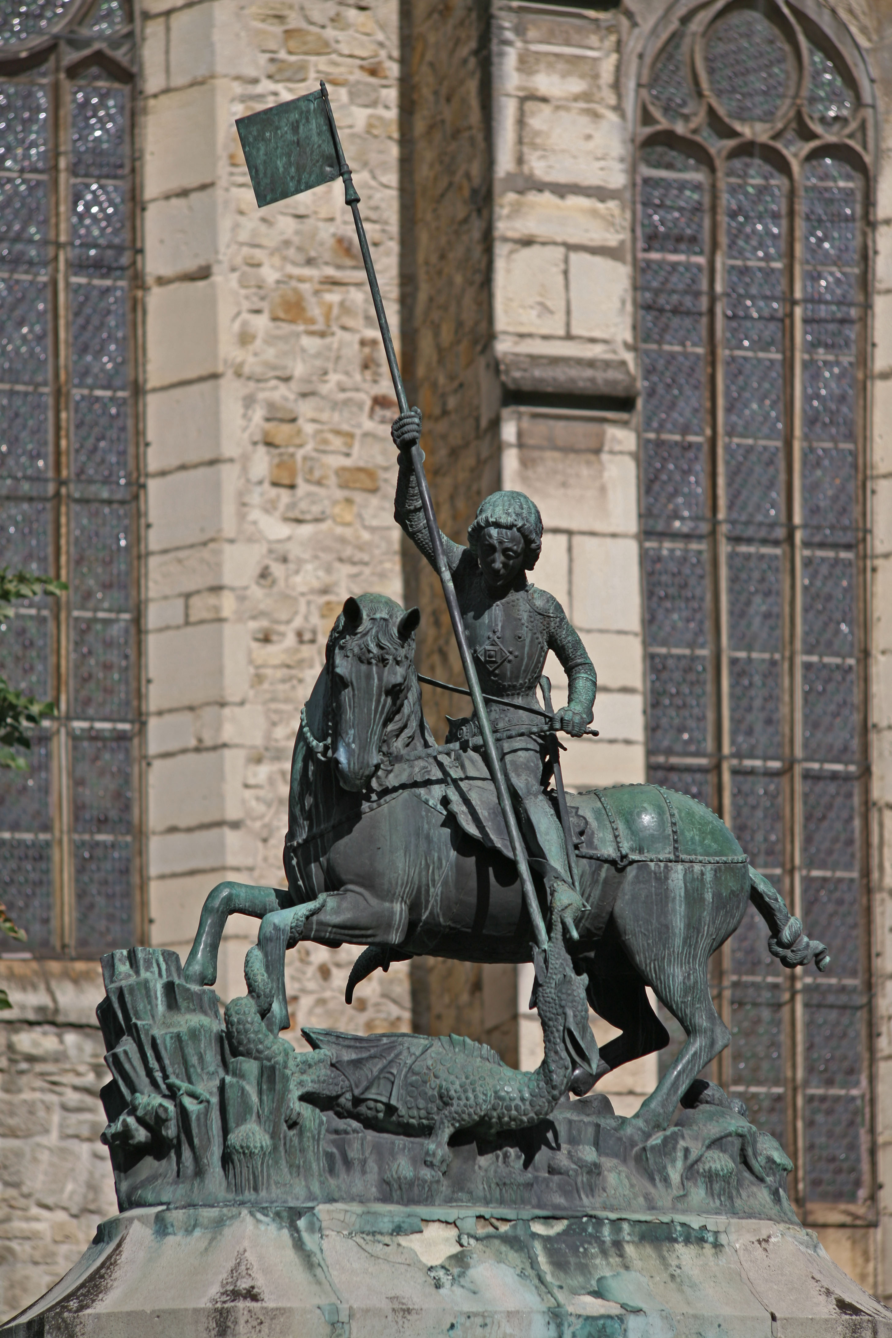 Biserica reformată Matia